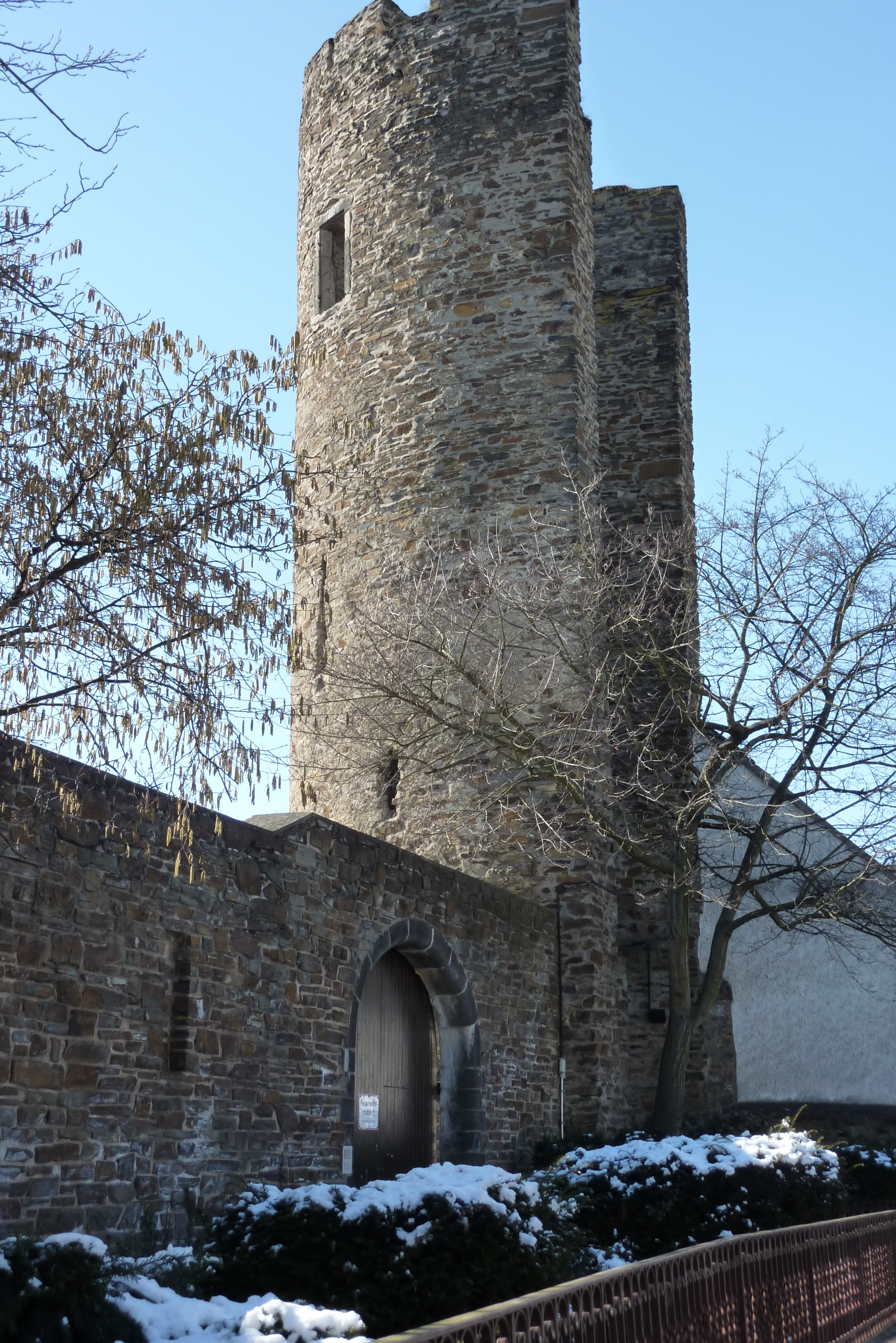 Stadtbefestigung (Ahrweiler), Bitzenturm